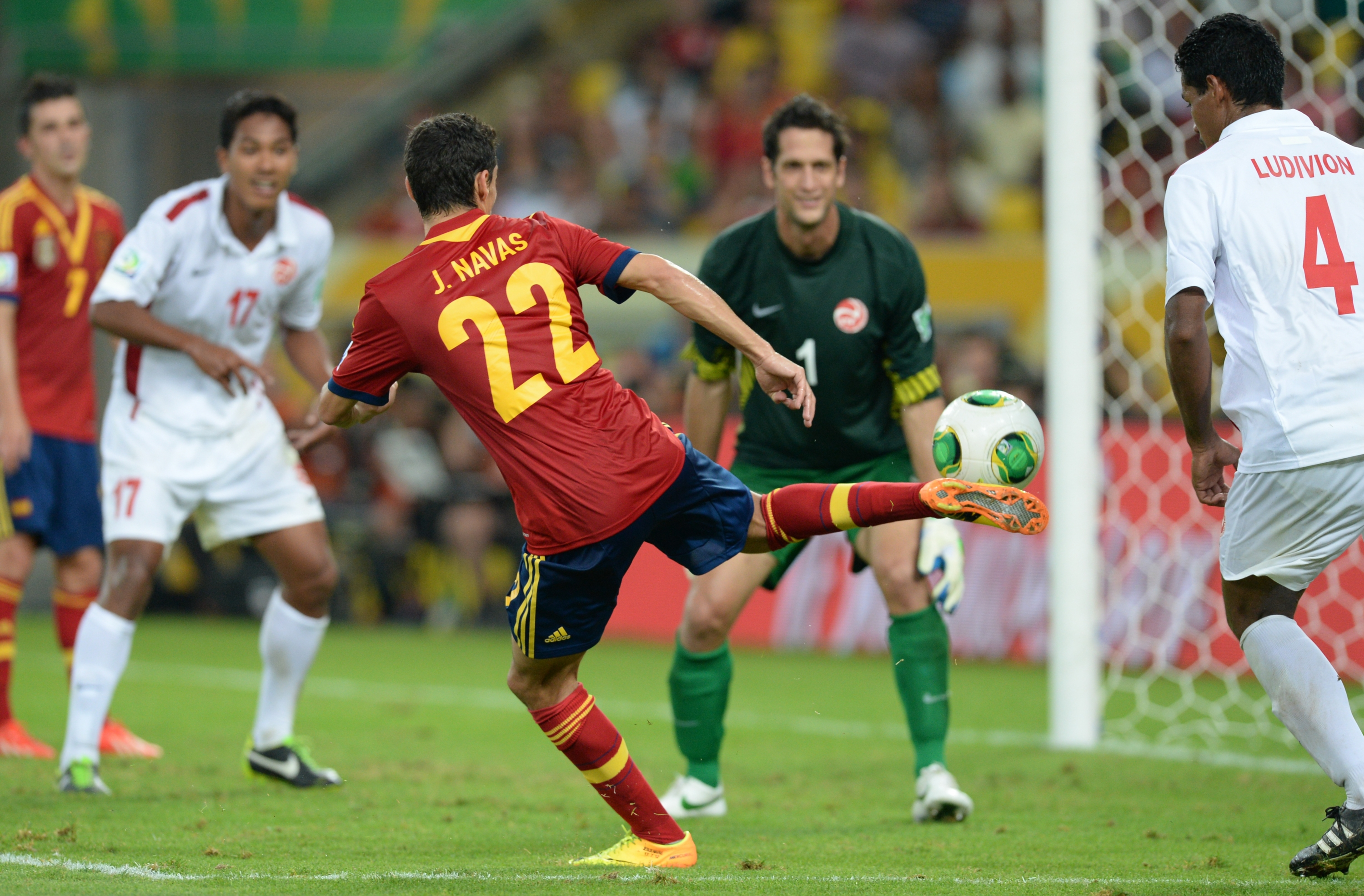 Espanha e Taiti se enfrentam na Copa das Confederações 2013